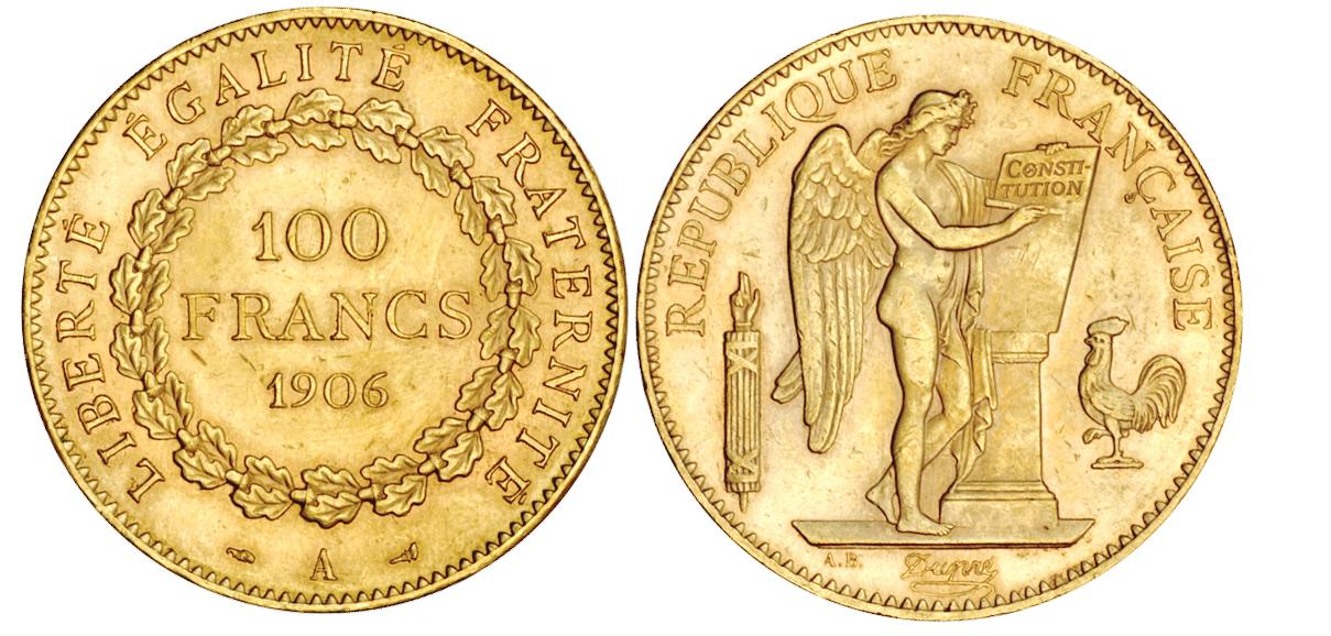 Pièce de 100 Francs OR 1906 A 32,25 g. diamètre 35 mm.